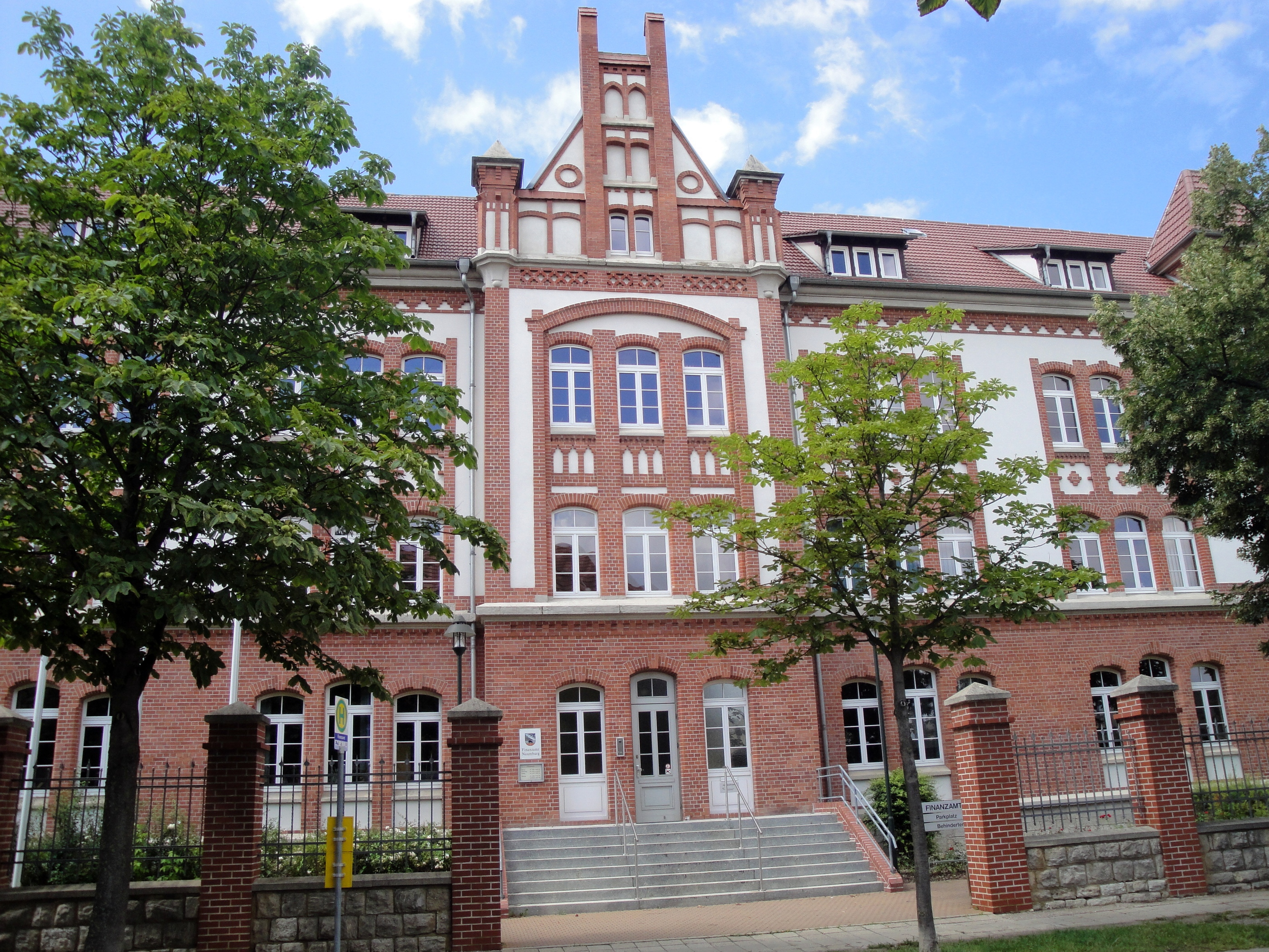 Finanzamt Naumburg (Saale)